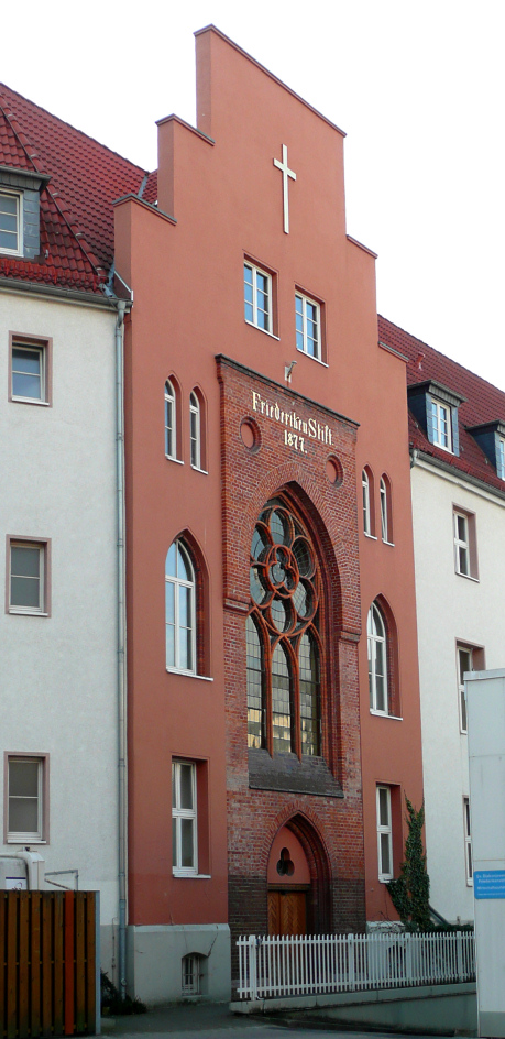 Kirche an Friederikenstift in Hannover